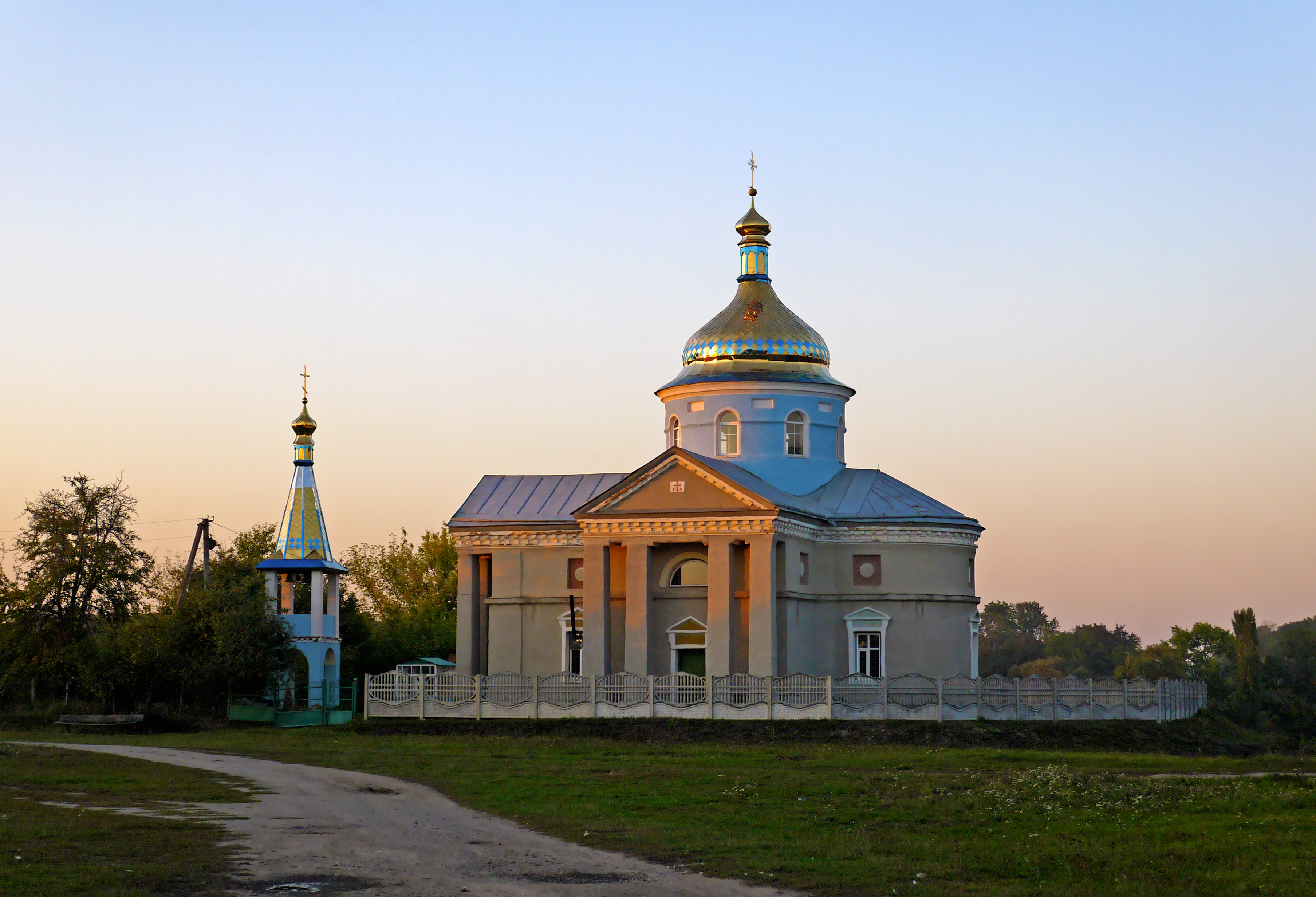 Михайлівська церква, Нова Гребля